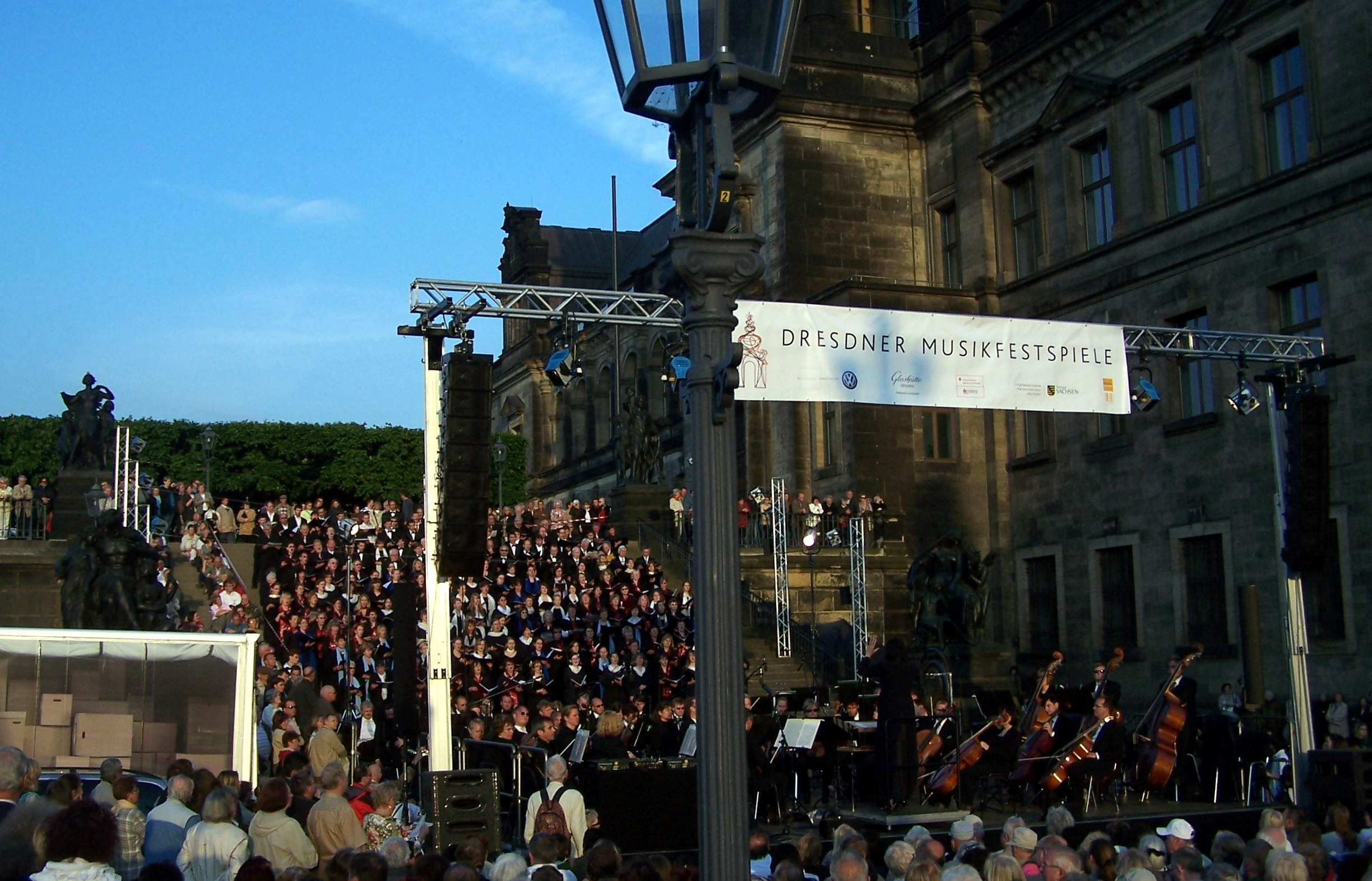 Freiluftkonzert "Dresden singt und musiziert" im Rahmen der Dresdner Musikfestspiele 2010, auf/vor der Treppe zur Brühlschen Terrasse. Mitwirkende: Neue Elbland Philharmonie und mehrere Chöre